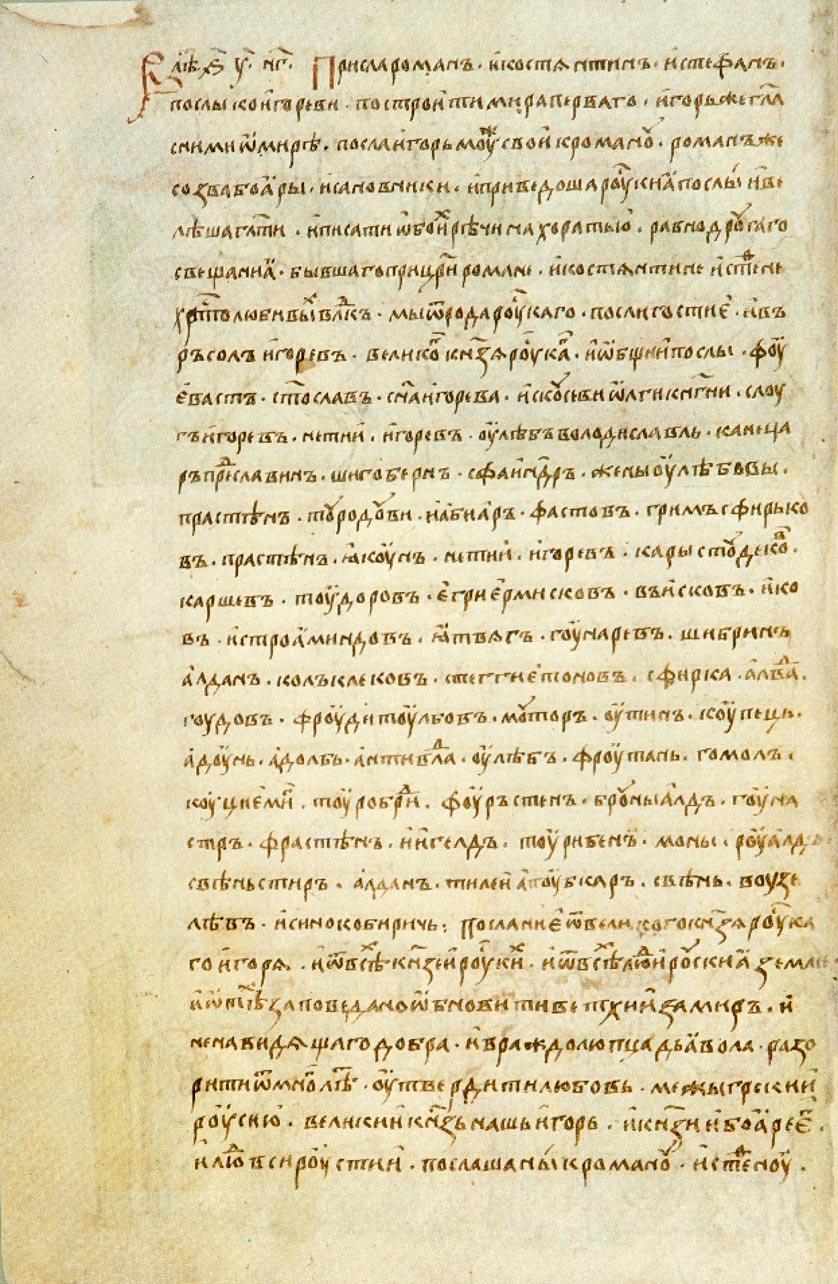 Русско-византийский договор 944 года Радзивиловская рукопись лист 56